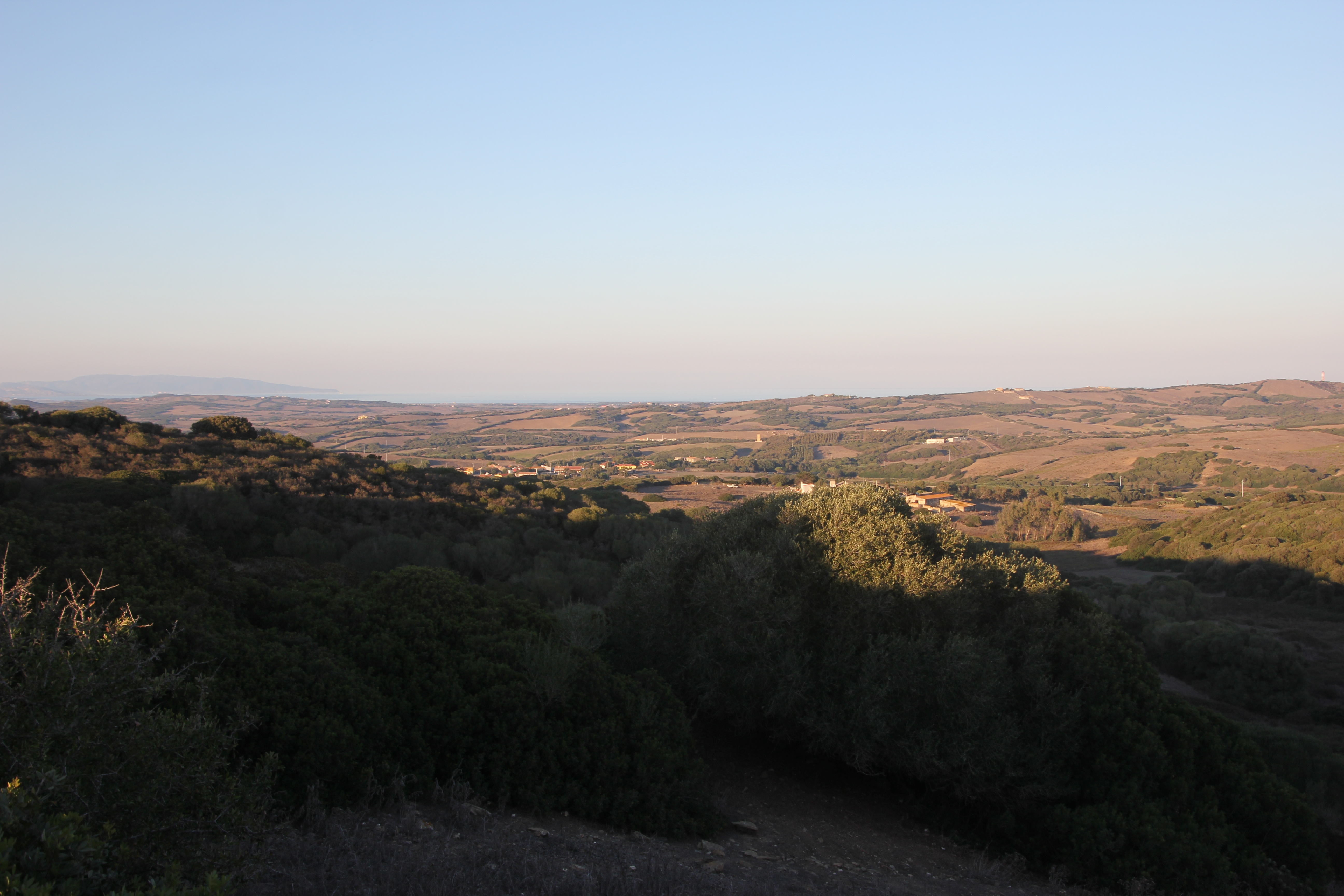 Sassari, frazione Biancareddu